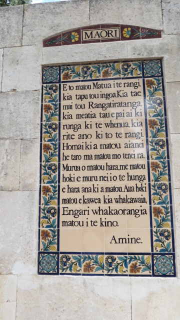 Church of the Pater Noster, Mount of Olives, Jerusalem כנסיית אבינו שבשמים Sanctuary of the Eleona